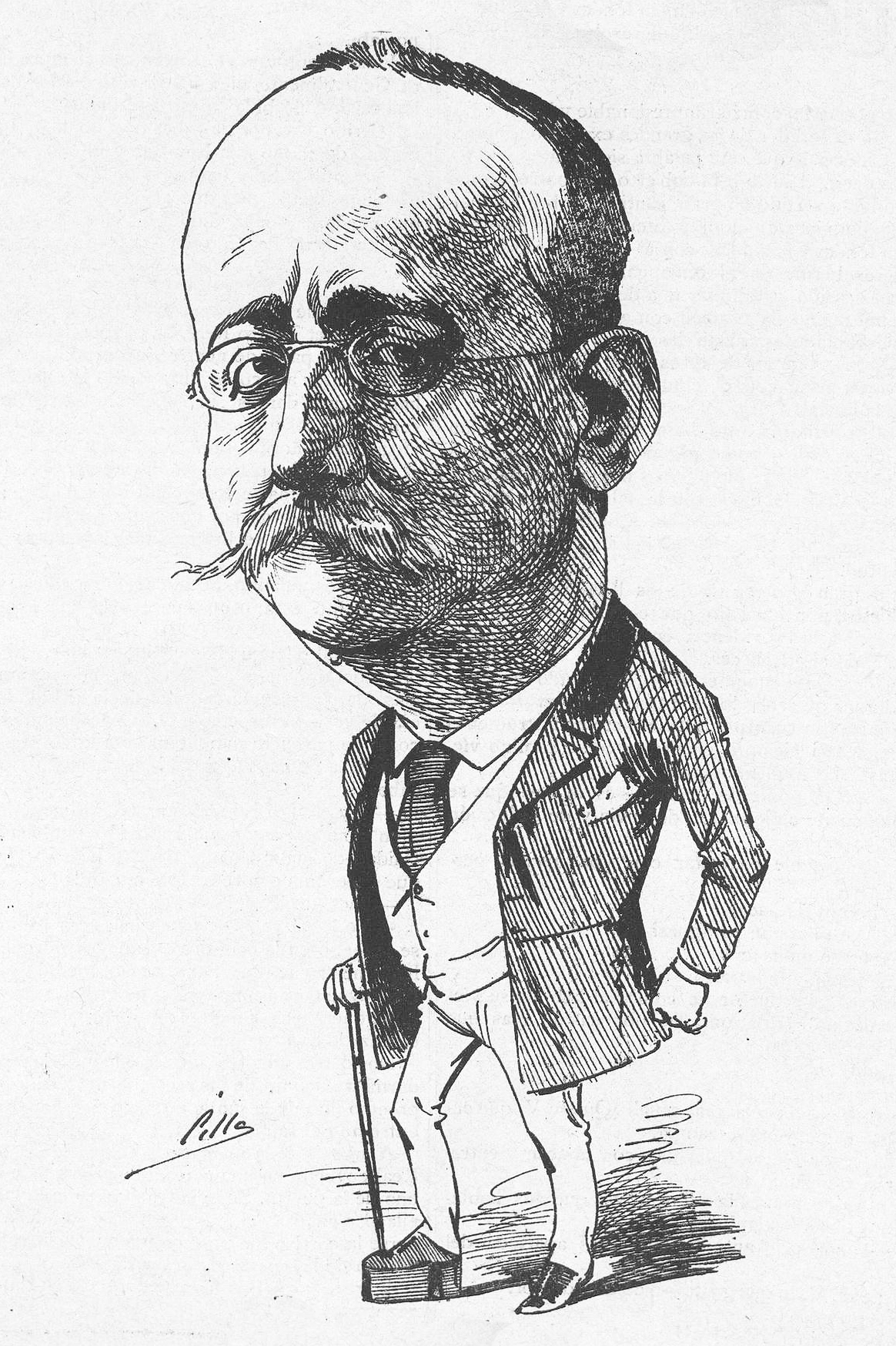 Enrique Hernández y Gil de Tejada.